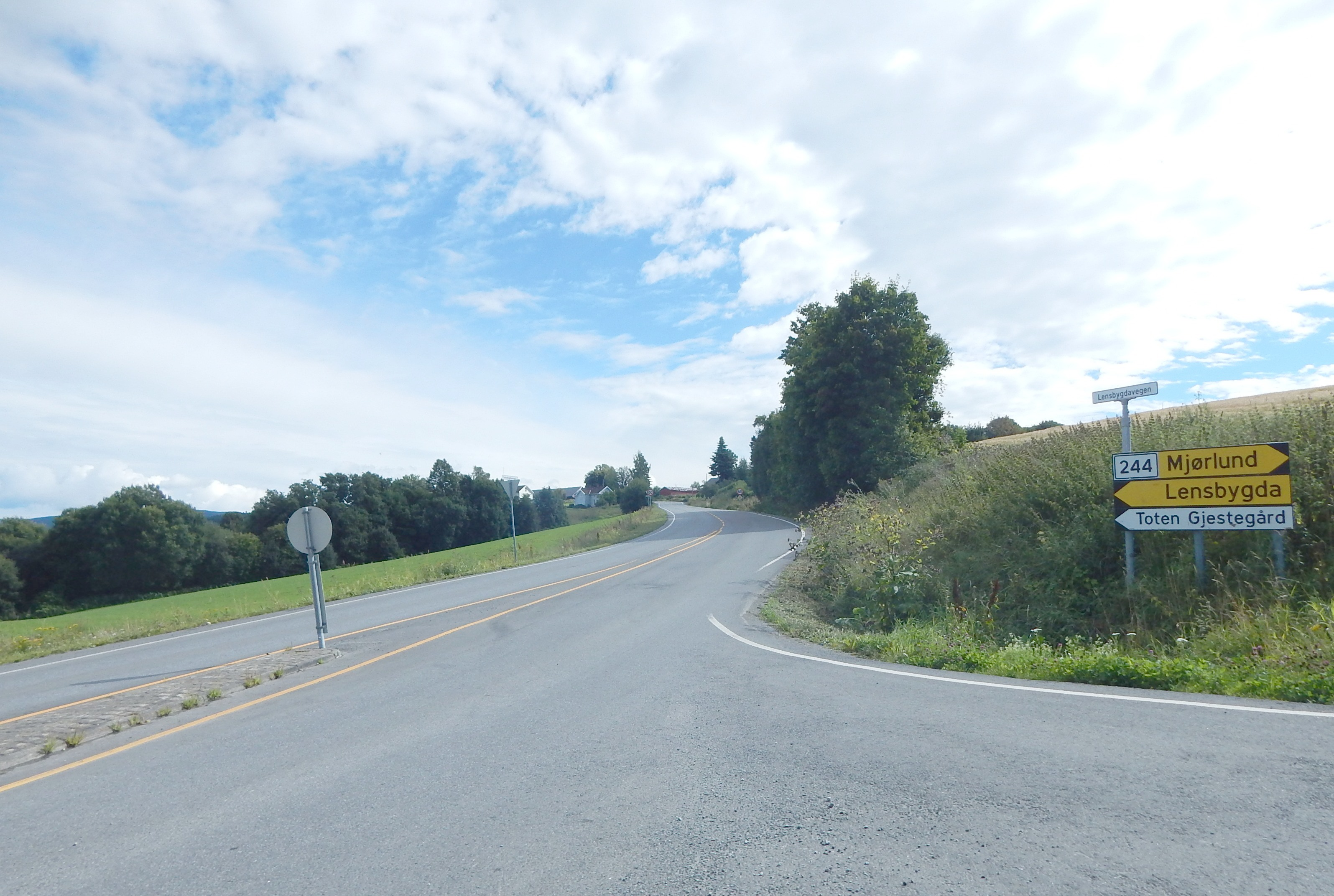 Lensbygdavegen (fylkesvei 2338, tidl. 73) i krysset med primær fylkesvei 244